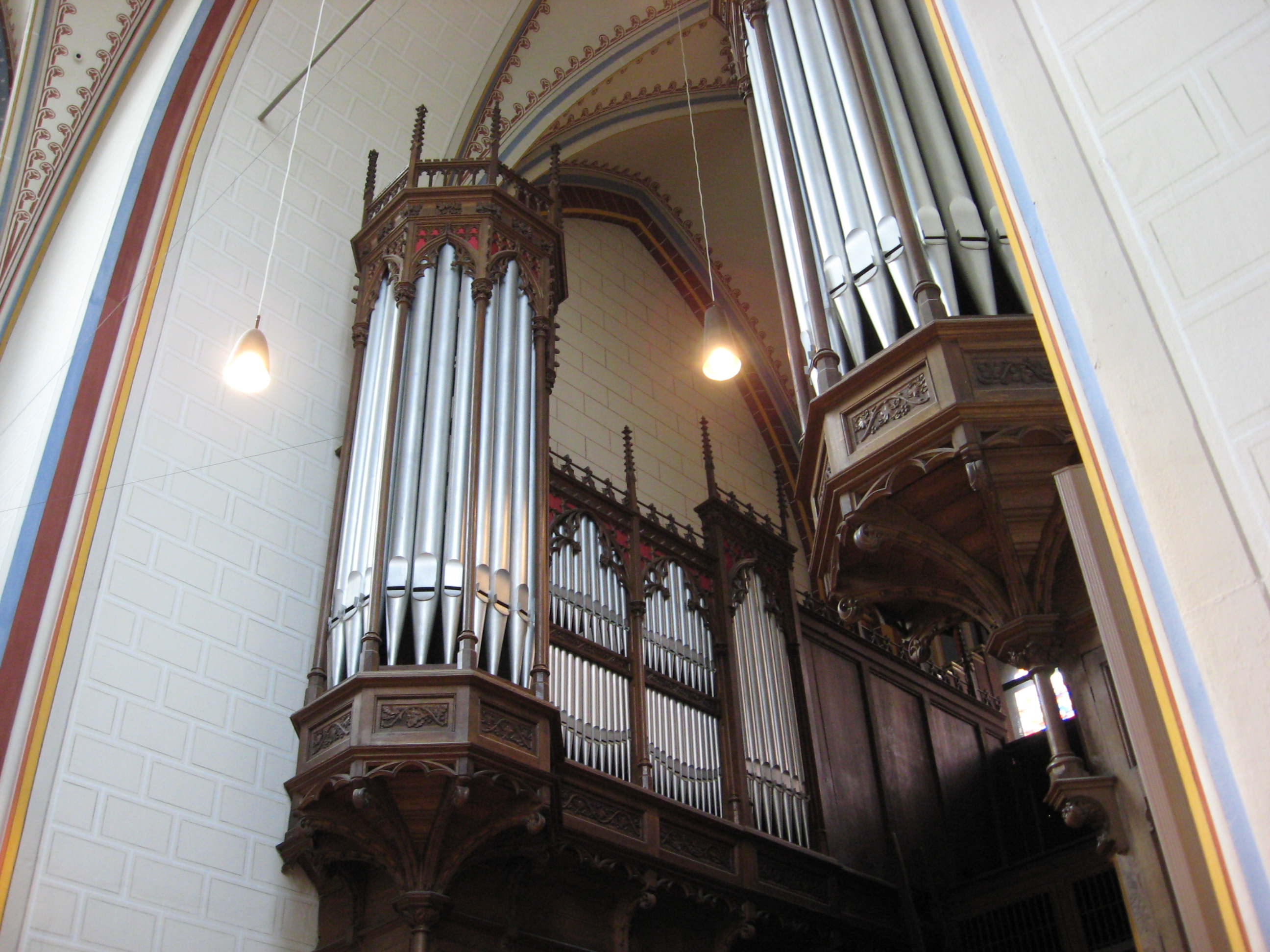 Hauptorgel der Bonner Marienkirche